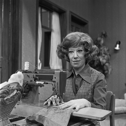 Ronny Bierman als Kitty Overwater in Hotel de Botel